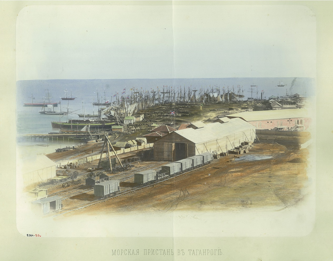 Морская пристань в Таганроге